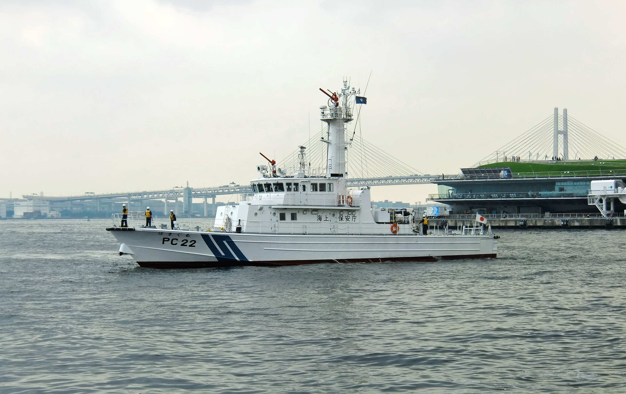 海上保安庁 巡視船PC22「はまぐも」(Japan Coast Guard PC22 HAMAGUMO)